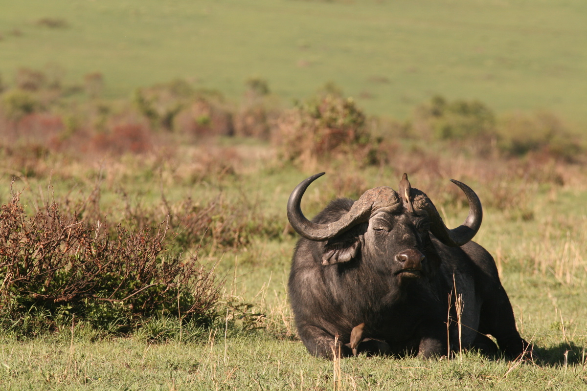 African Buffalo, Masai Mara, Kenya